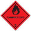 flammable liquid (category 3)